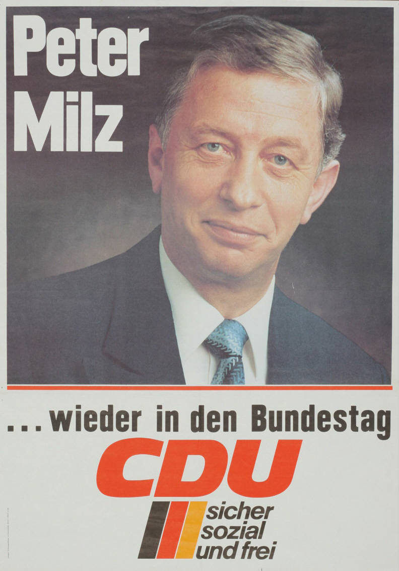 Peter Milz ... wieder in den Bundestag CDU sicher sozial und freiAbbildung:PorträtfotoPlakatart:Kandidaten-/Personenplakat mit PorträtAuftraggeber:CDU-Bundesgeschäftsstelle, Abt. Öffentlichkeitsarbeit, BonnObjekt-Signatur:10-001: 2467Bestand:Plakate zu Bundestagswahlen (10-001)GliederungBestand10-18:Plakate zu Bundestagswahlen (10-001) » Die 9. Bundestagswahl am 5. Oktober 1980 » CDU » Mit PorträtfotoLizenz:KAS/ACDP 10-001: 2467 CC-BY-SA 3.0 DE